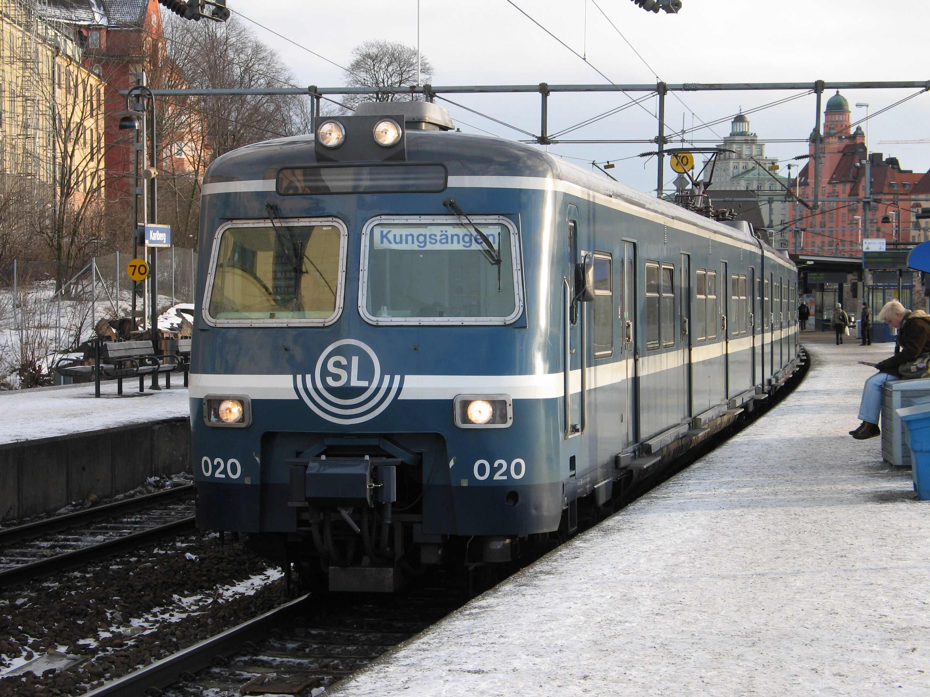 X420 020 Karlberg